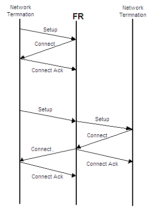 opis prymitywow w ustanawianiu polczenia wirtulaego w FR